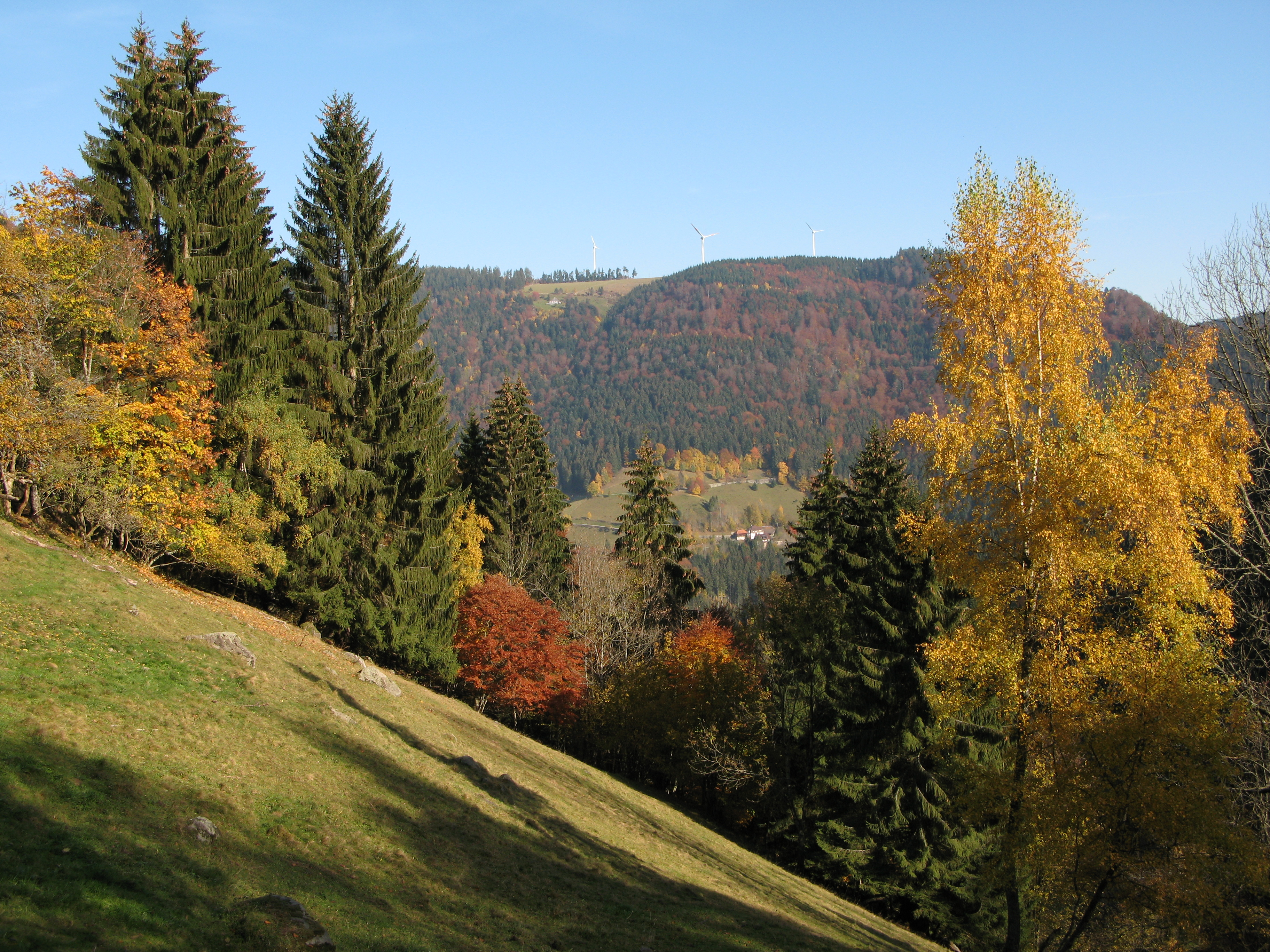 Die Hintereckhütte gesehen am Vesperplatz unterhalb der Zweribachwasserfällen am Zweitälersteig im Schwarzwald.